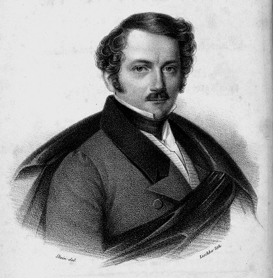 Gustav Nicolai, Lithographie aus: Gustav Nicolai: Italien wie es wirklich ist. Bericht über eine merkwürdige Reise in den hesperischen Gefilden als Warnungsstimme für Alle, welche sich dahin sehnen, 2. Auflage, Leipzig, Wigand, 1835.